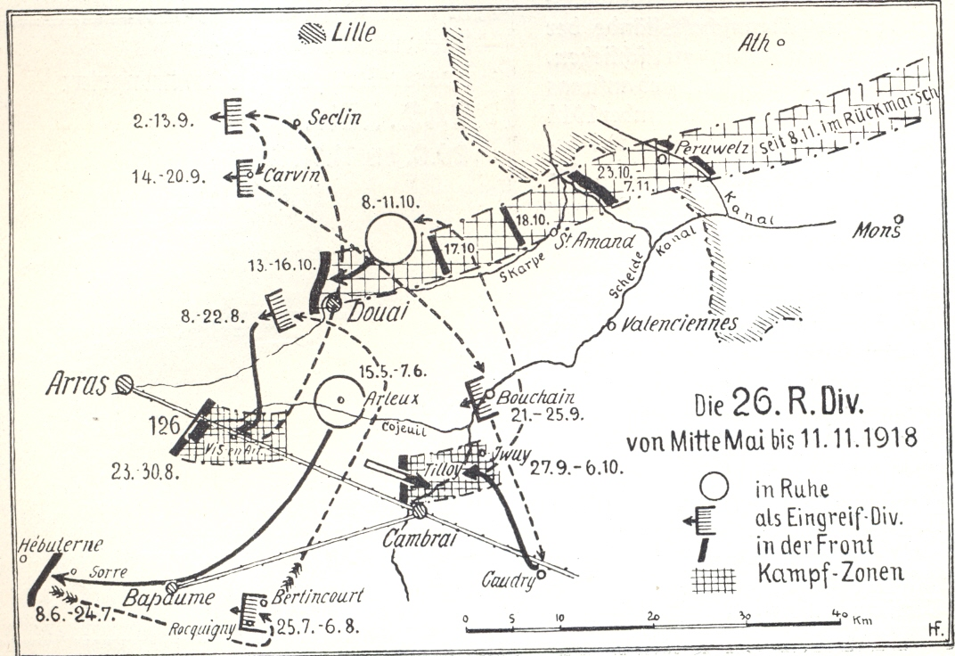 Karte: Rückzugskämpfe der 26. (Württ.) Reserve-Division 1918